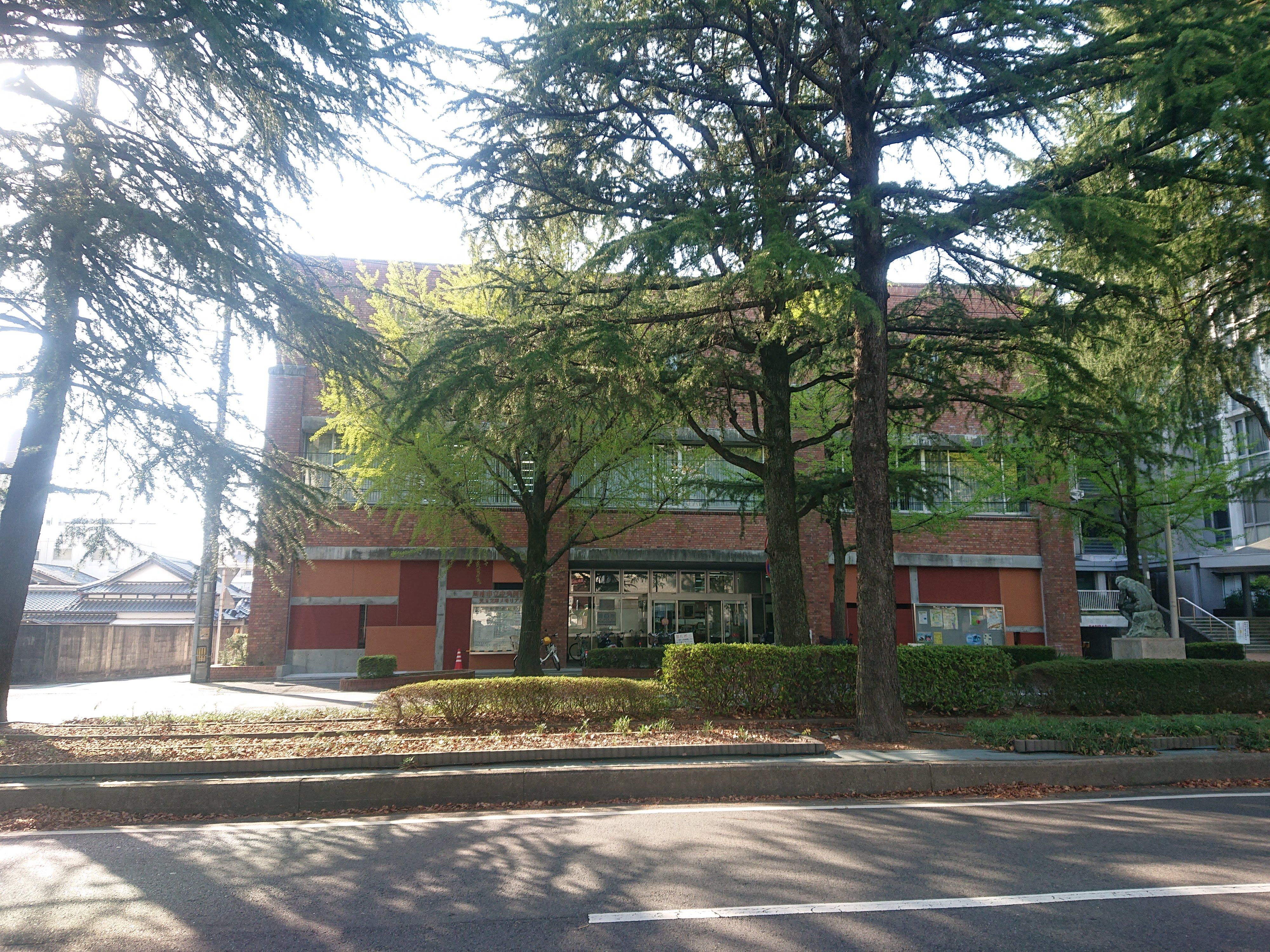 周南市立中央図書館 （岐山通より撮影）